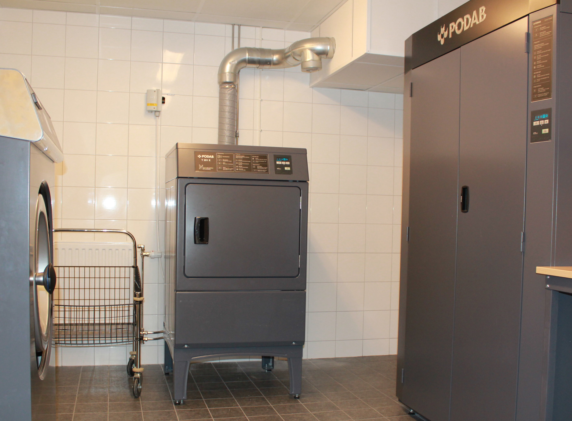 Modell: ProLine T201 E från PODAB